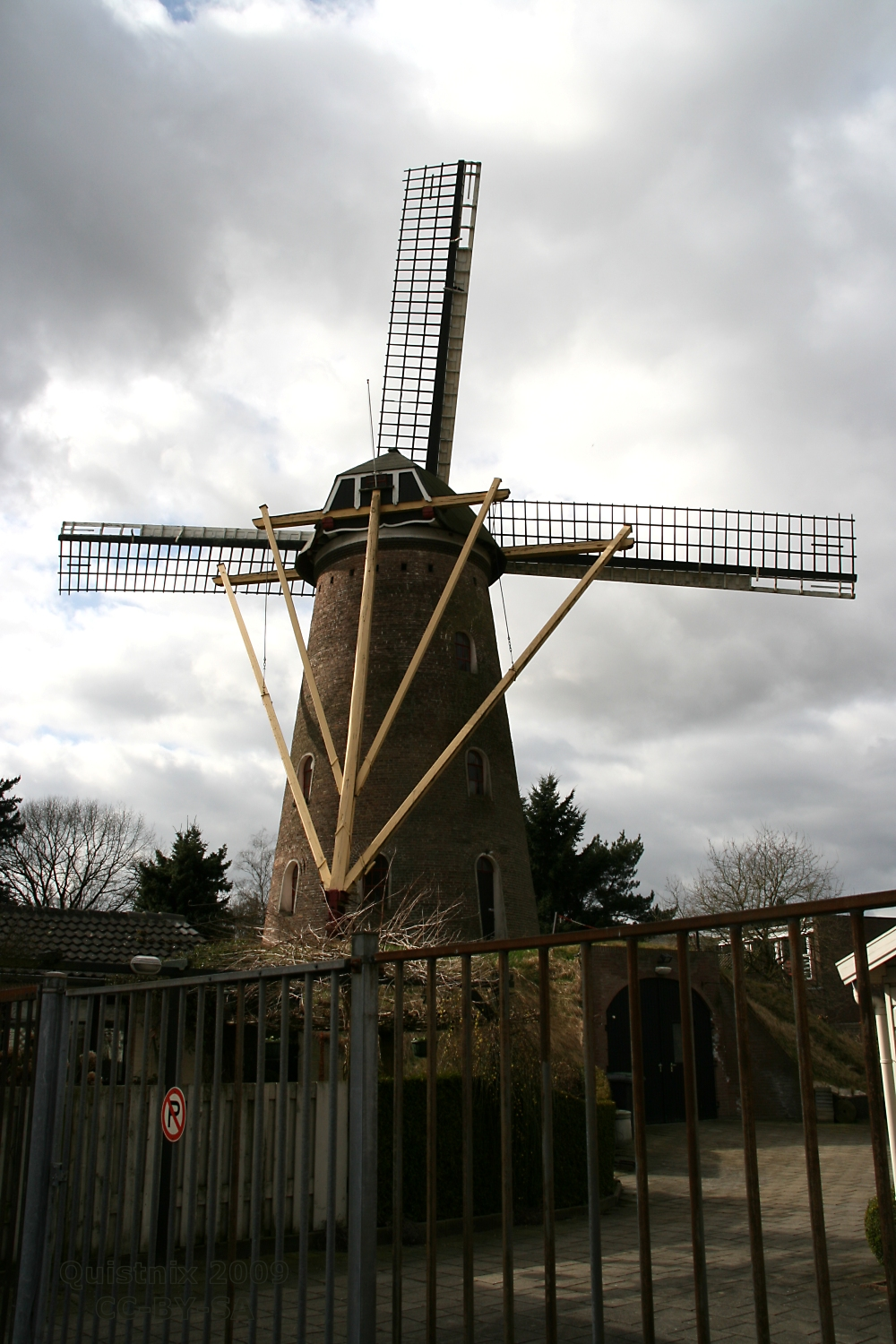 Aalst: Aalstermolen, achter gesloten hek